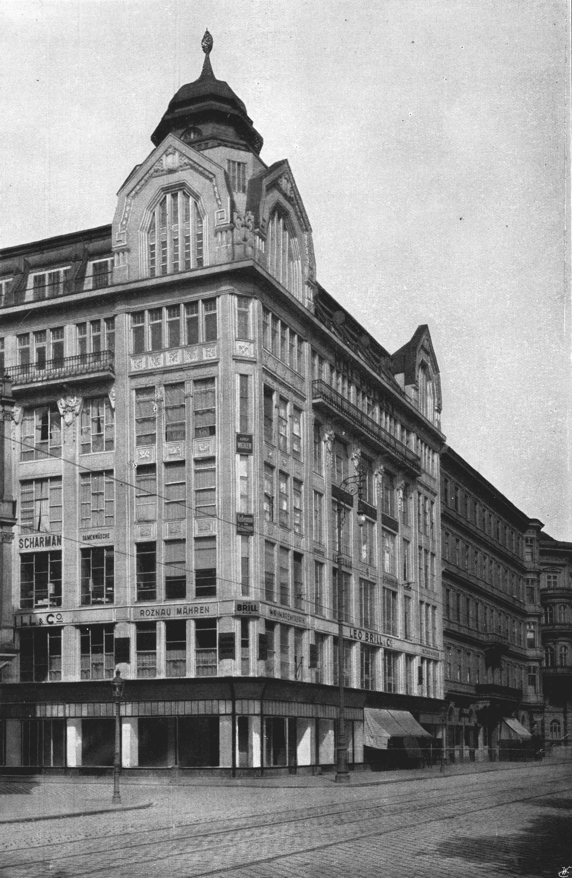 Kai-Palast, Franz-Josefs-Kai 47, 1010 Wien. Architekt: Ignaz Reiser